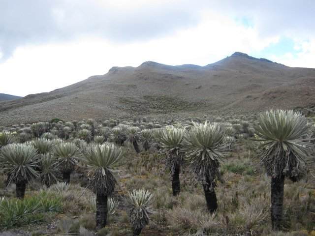 Esta fotografía fue tomada en el municipio colombiano con código 11001.